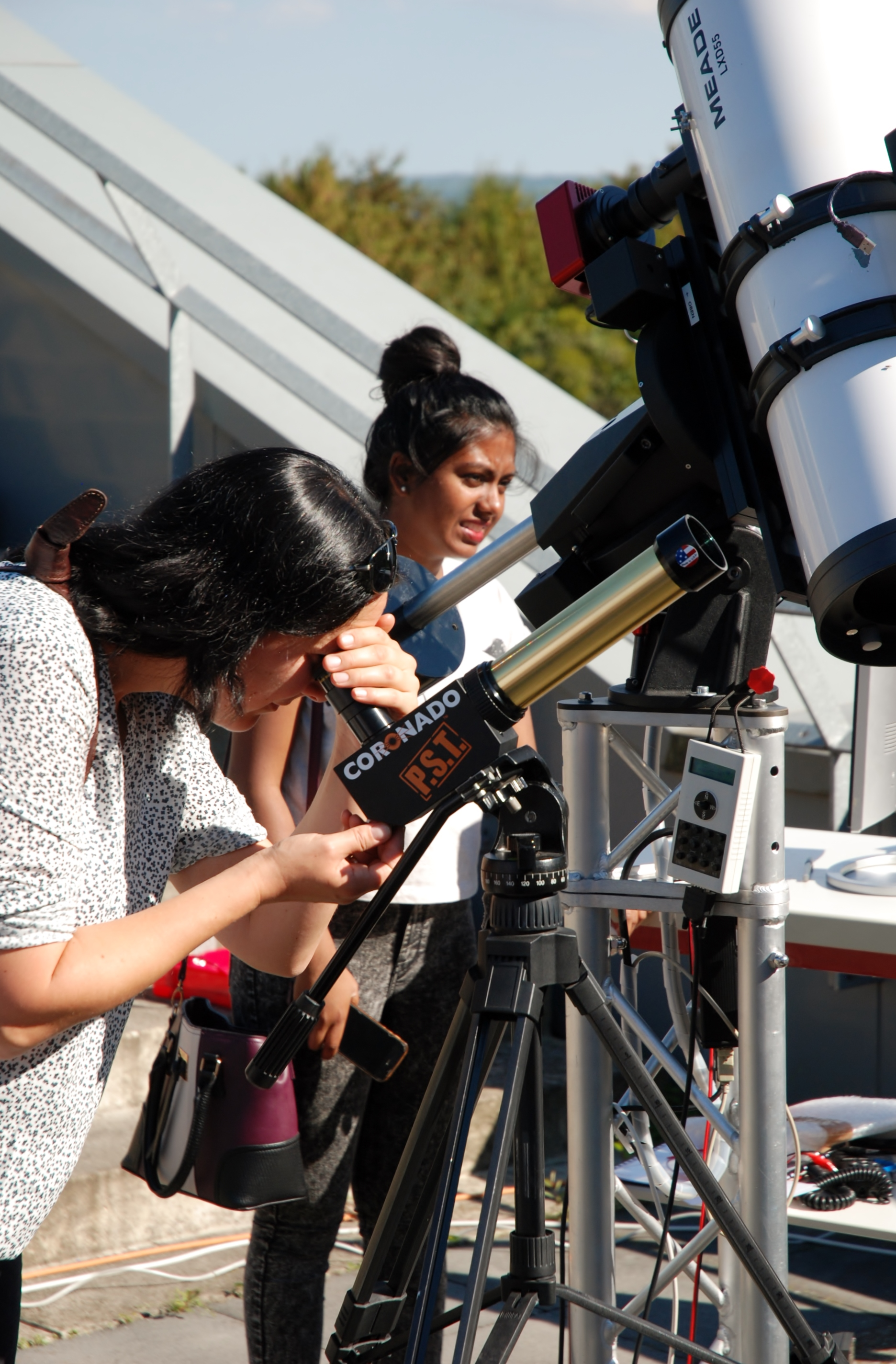 Sonnenbeobachtung auf der Himmelsbeobachtungsstation und Freiklasse des Science College Overbach